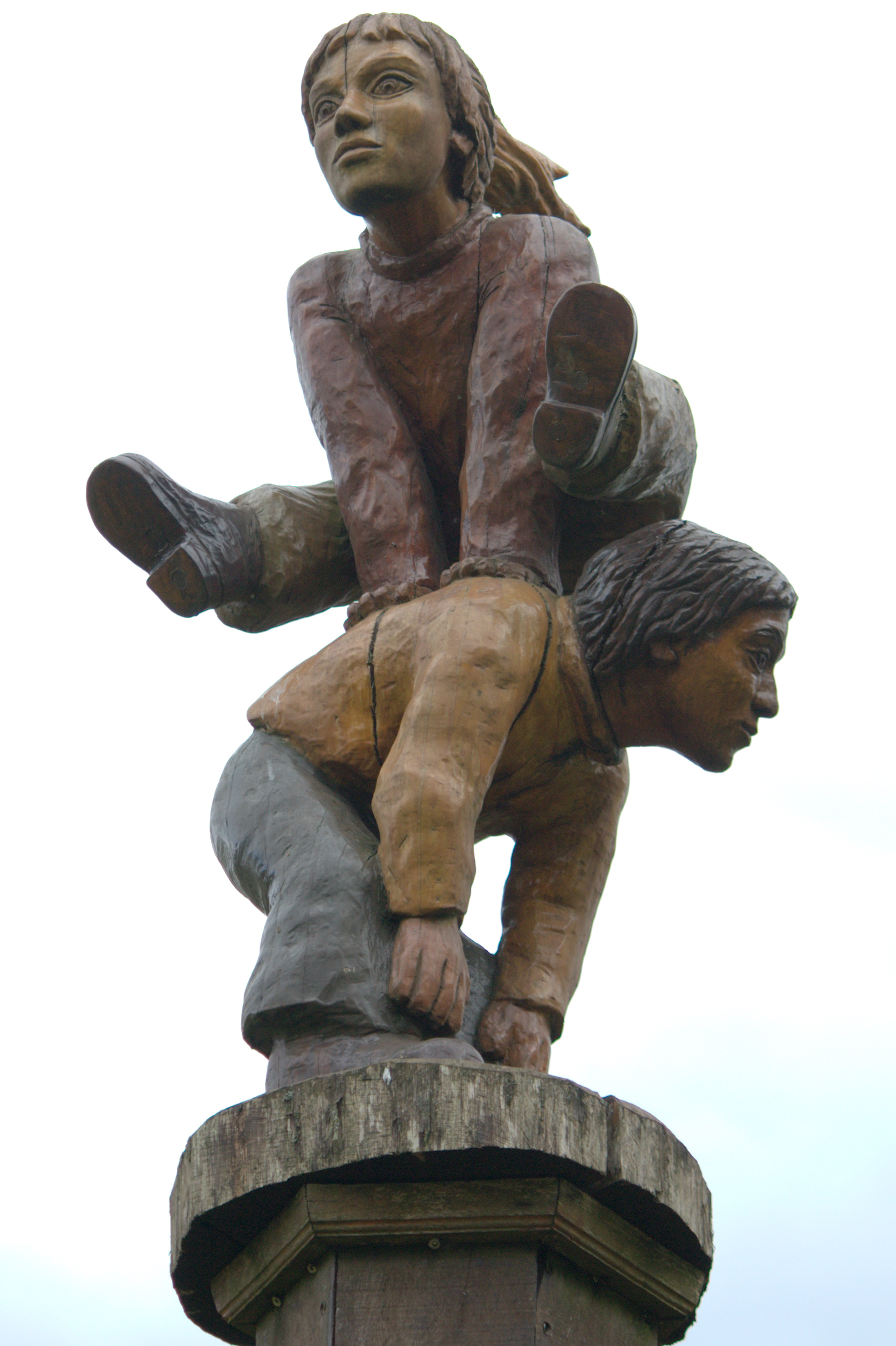 bovenop 'muziektent' in de glid